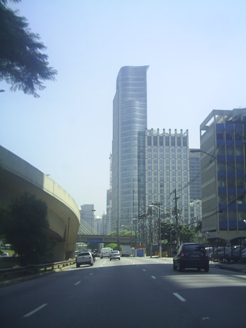 Sede do Bank Boston na Marginal do Rio Pinheiros, em São Paulo.